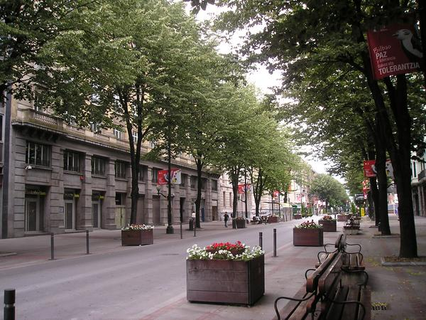 Bilboko Bide Nagusia.